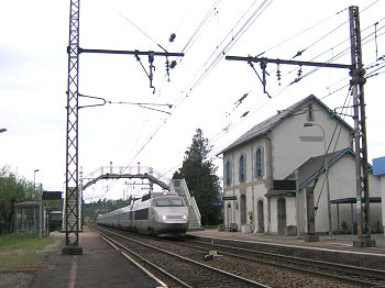 TGV Brive Lille au franchissement de la gare d'Ambazac près de Limoges